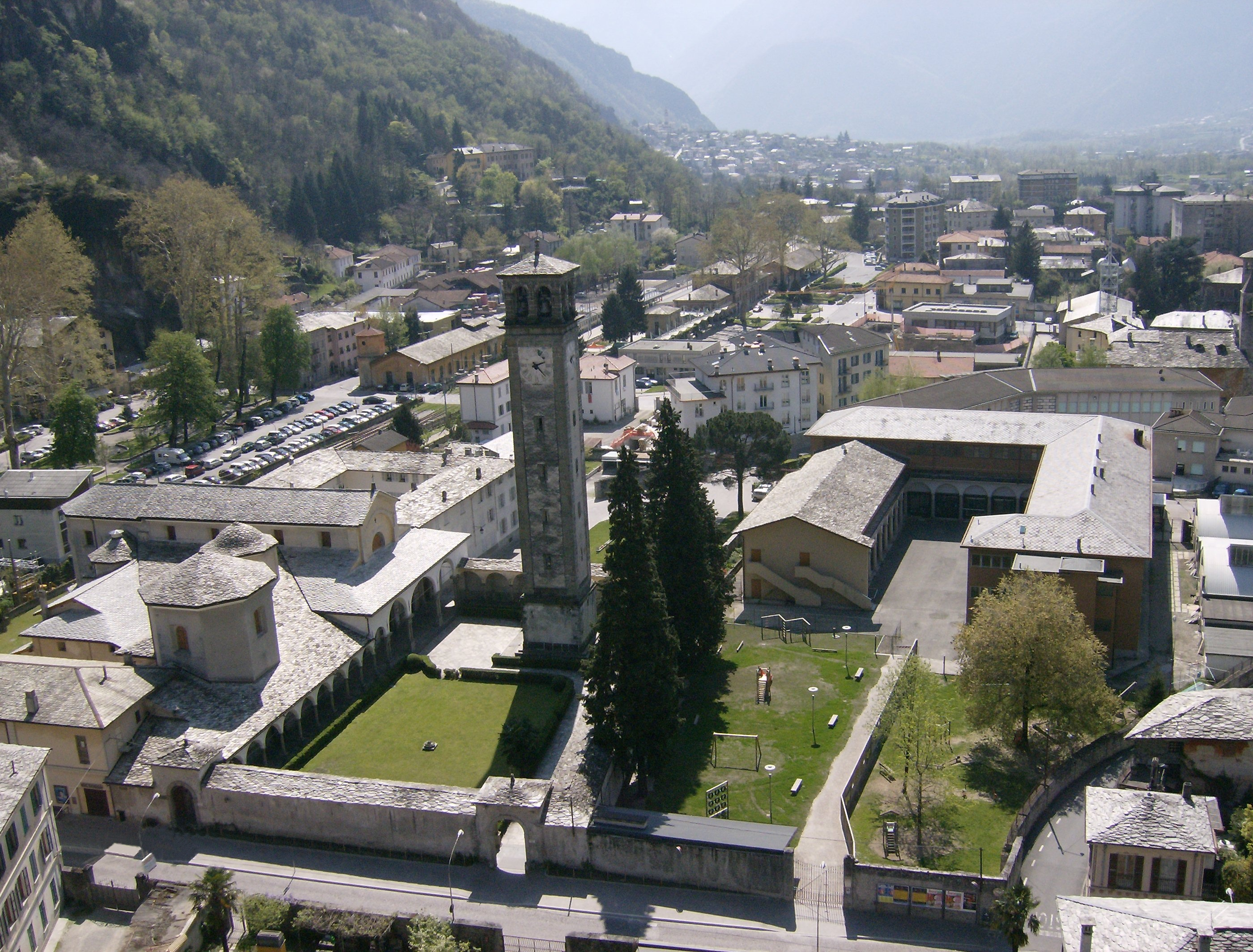 Panorama dal Parco Paradiso